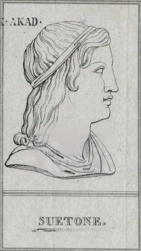 Suetonius, Gajus Tranquillus (lebte um 105 - 105)